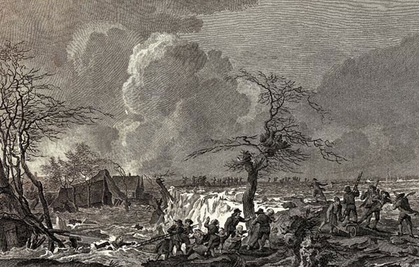 Dijkdoorbraak aan de Waal bij Doornik, een gravuren door Reinier Vinkeles (1741-1816) en Cornelis Brouwer naar een tekening van E. van Hardenberg, gepubliceerd in Beschrijving van de watersnood, door Cornelis Zillesen, Amsterdam, 1800